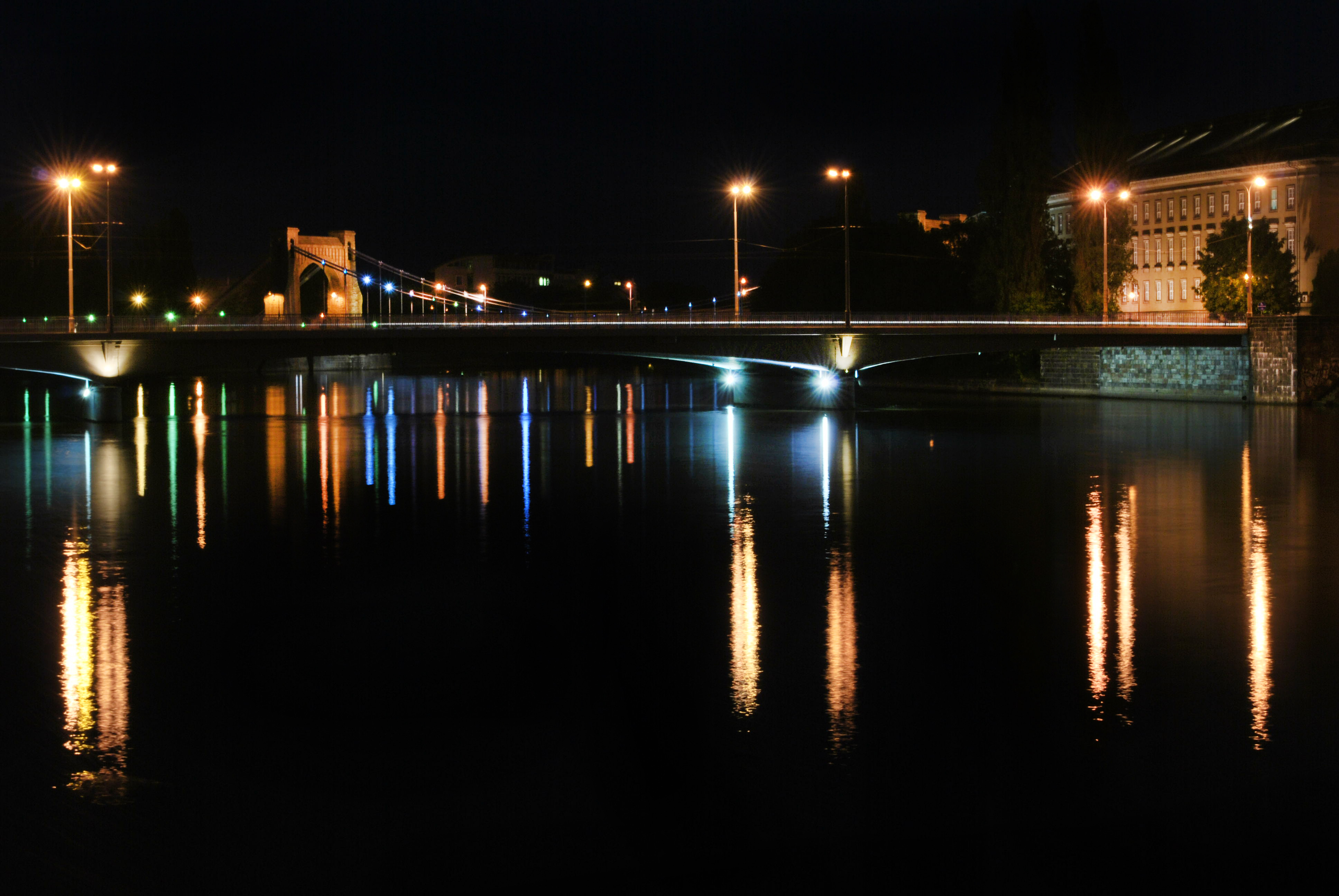 Wrocław, Most Grunwaldzki, 1907